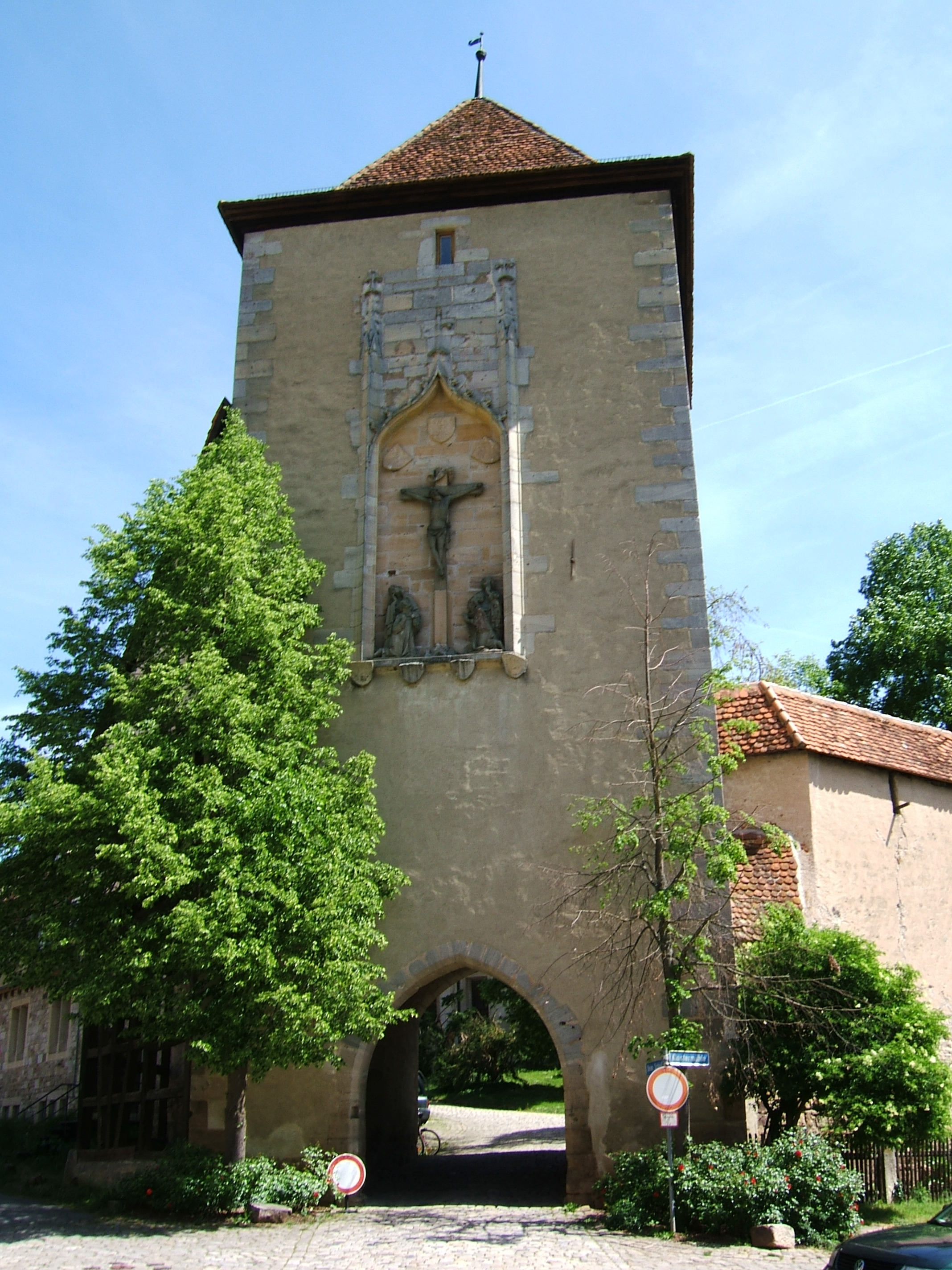 Ehemaliger Schreibturm des Klosters Bebenhausen im Schönbuch